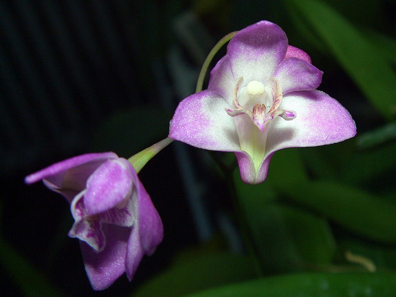 Dendrobium kingianum